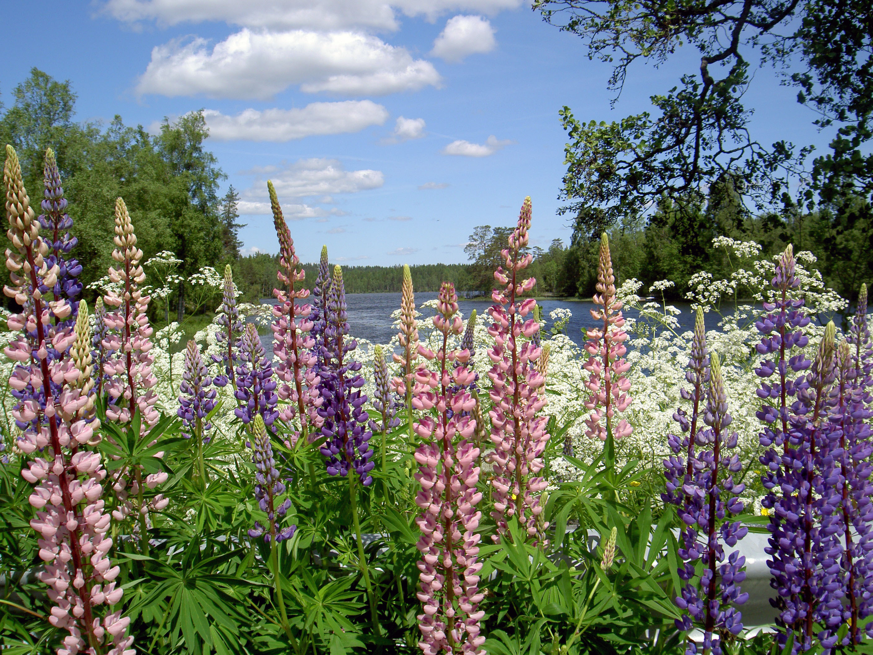 Lupiner vid Boskvarnasjön,Småland